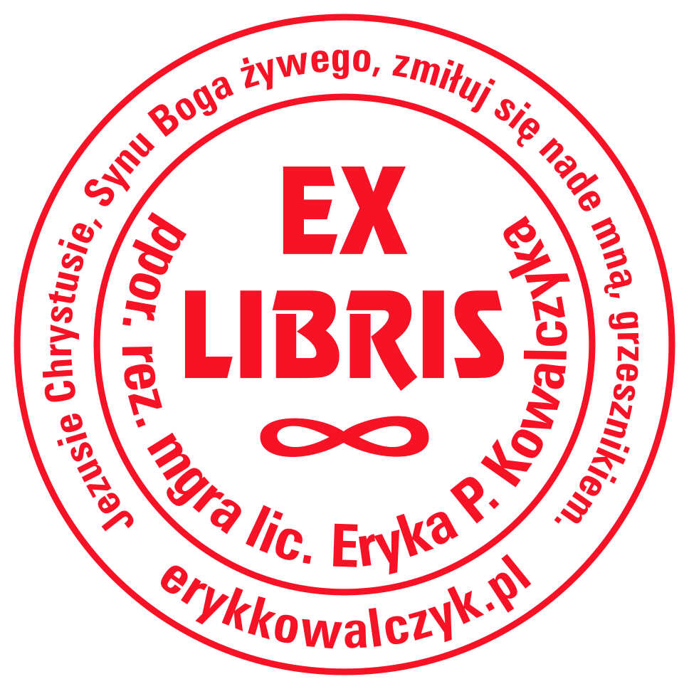 EX LIBRIS nowoczesny